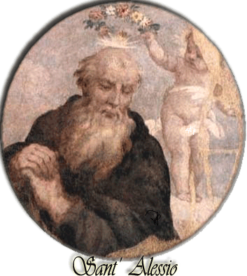 Saint Alexis Falconieri